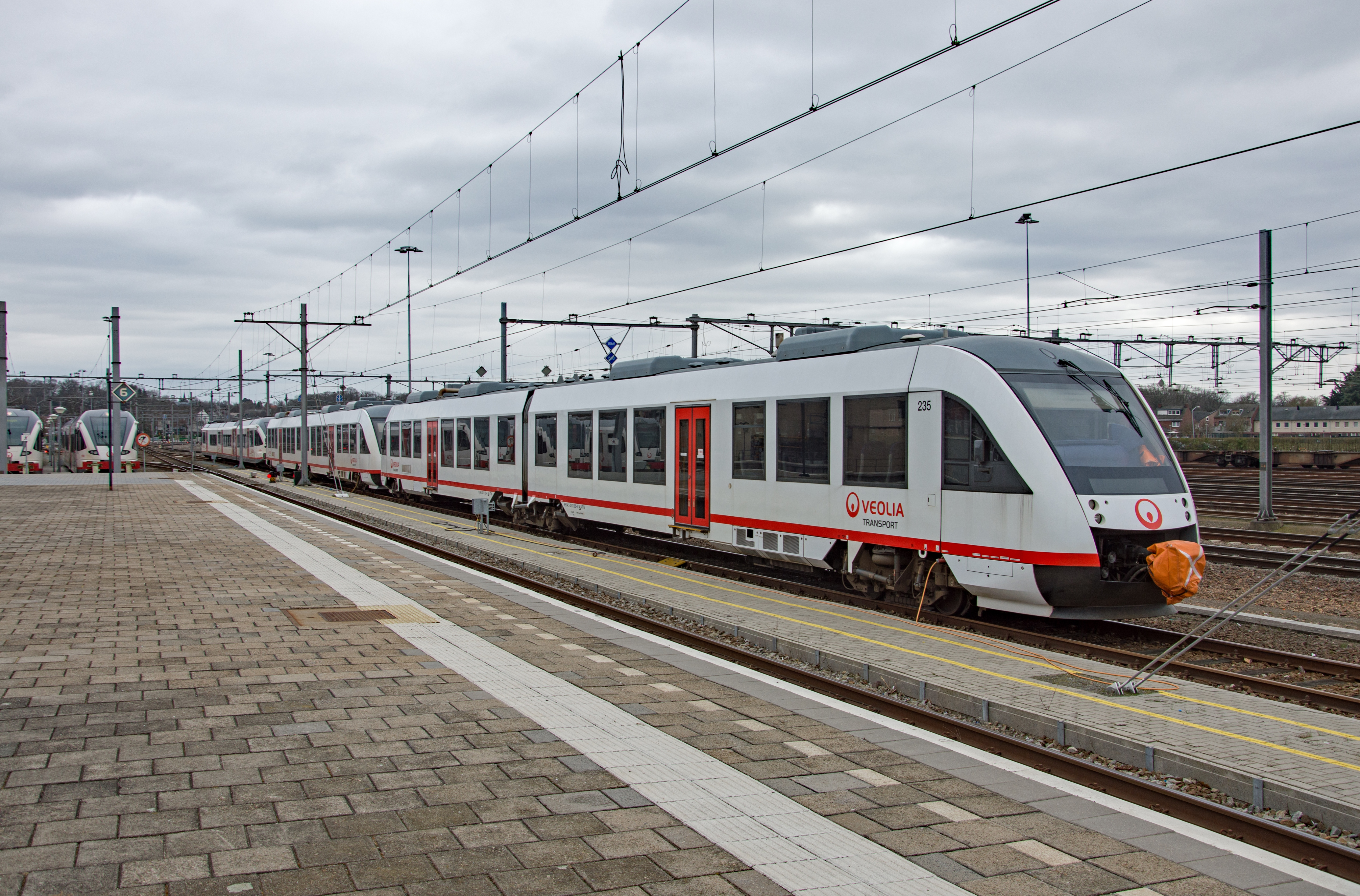 Veolia 235-237-353 genietend van hun zondagsrust in Venlo